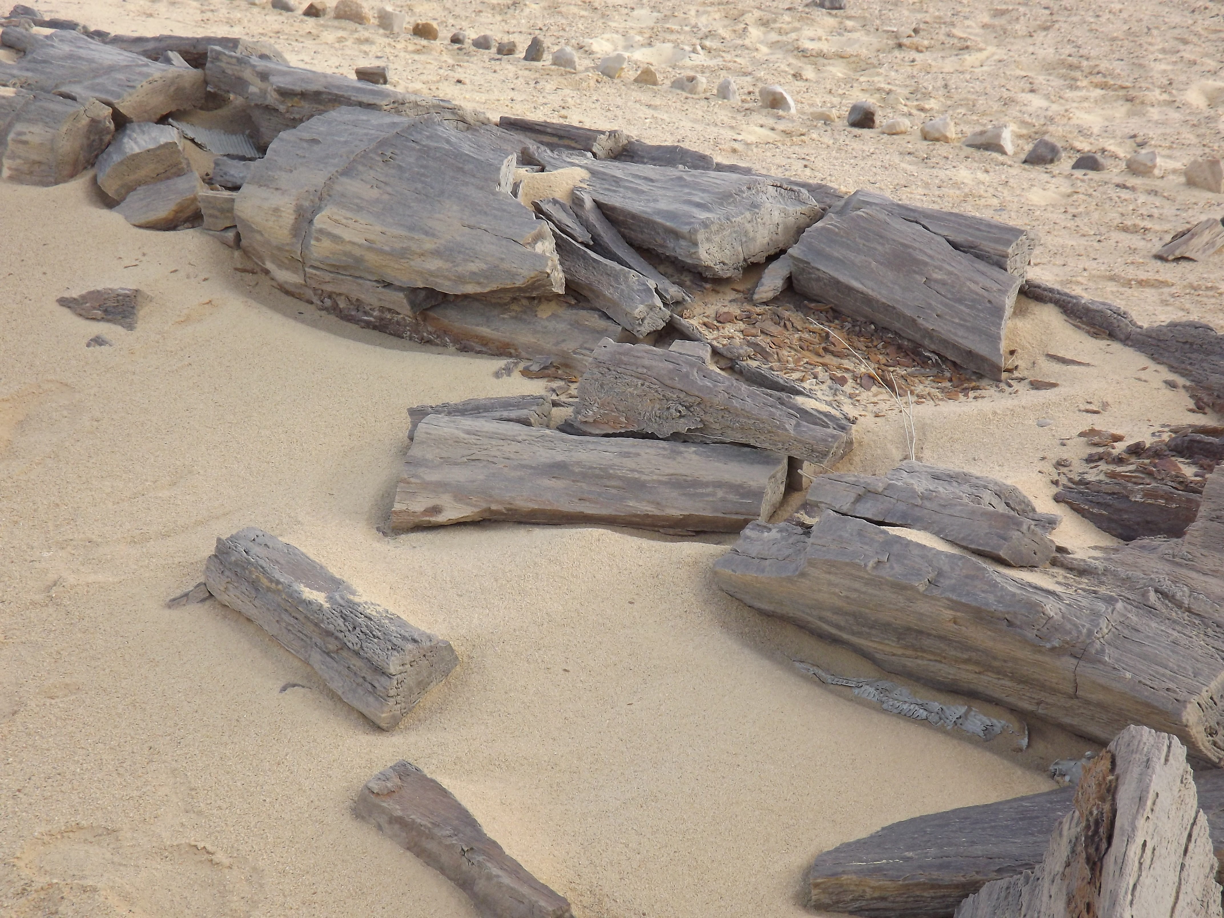 محمية قارون - الغابة المتحجرة - الفيوم